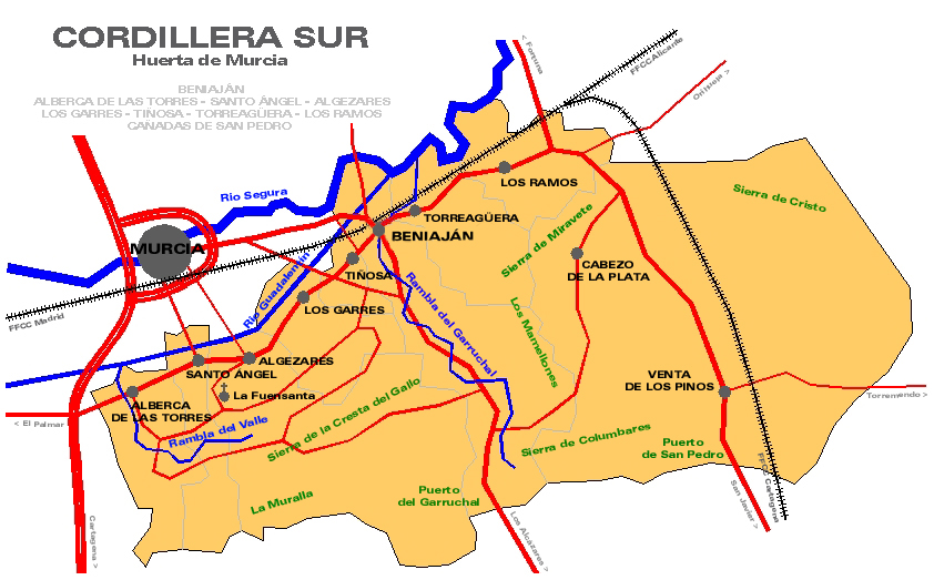 Territorio integrado en la Huerta de Murcia, España, cerrando por el sur el Valle del río Segura.